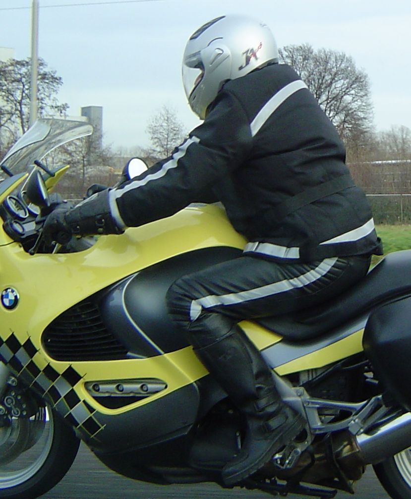 Réduire les risques courants en se protégeant.